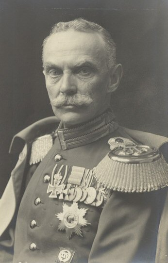 Fotografie des Erbprinzen Bernhard von Sachsen-Meiningen (1851-1928)